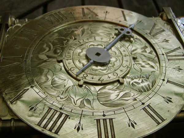 Voorbeeld van graveerwerk op een wijzerplaat van een lantaarnklok.